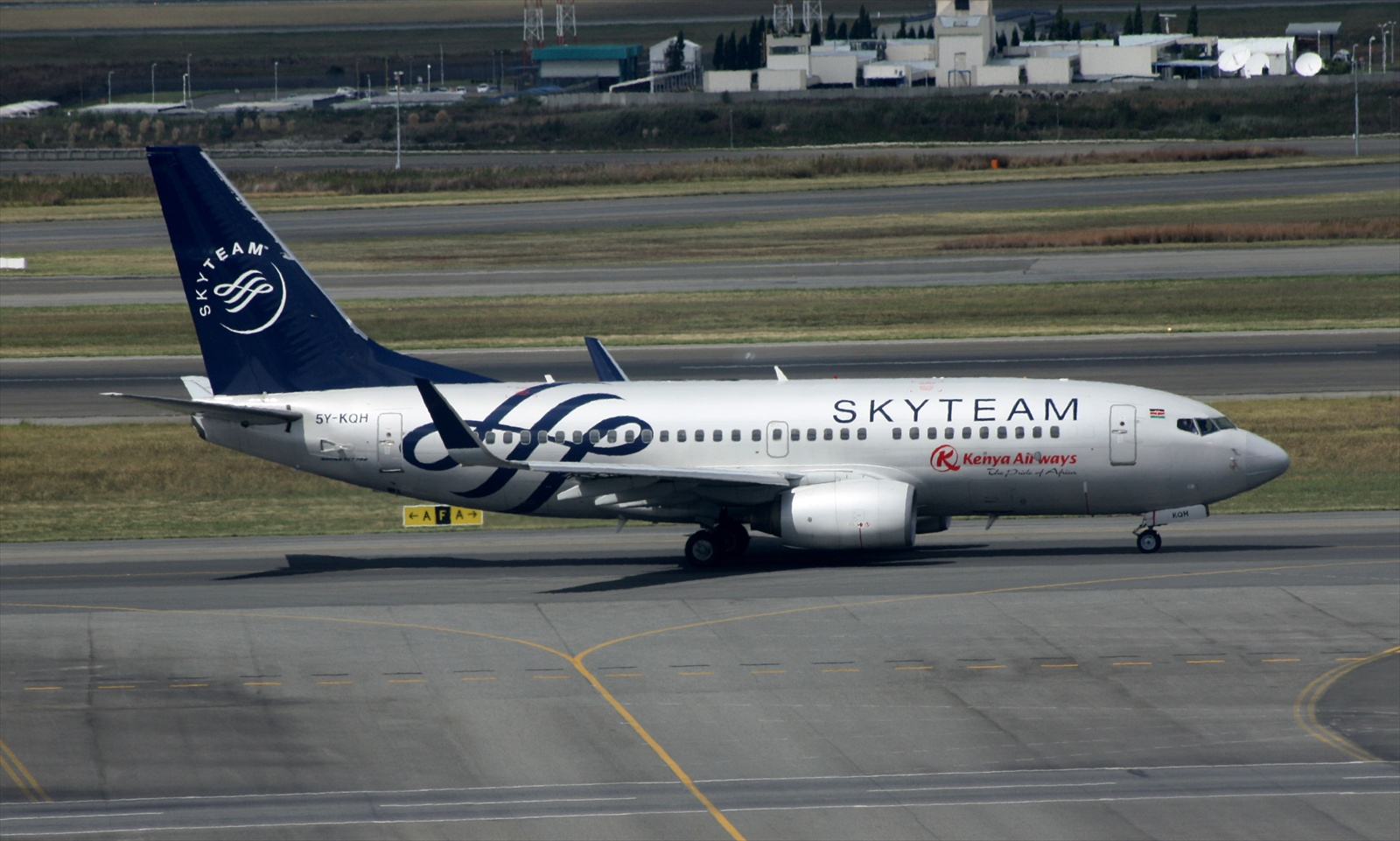 Kenya Airways B737-7U8 5Y-KQH